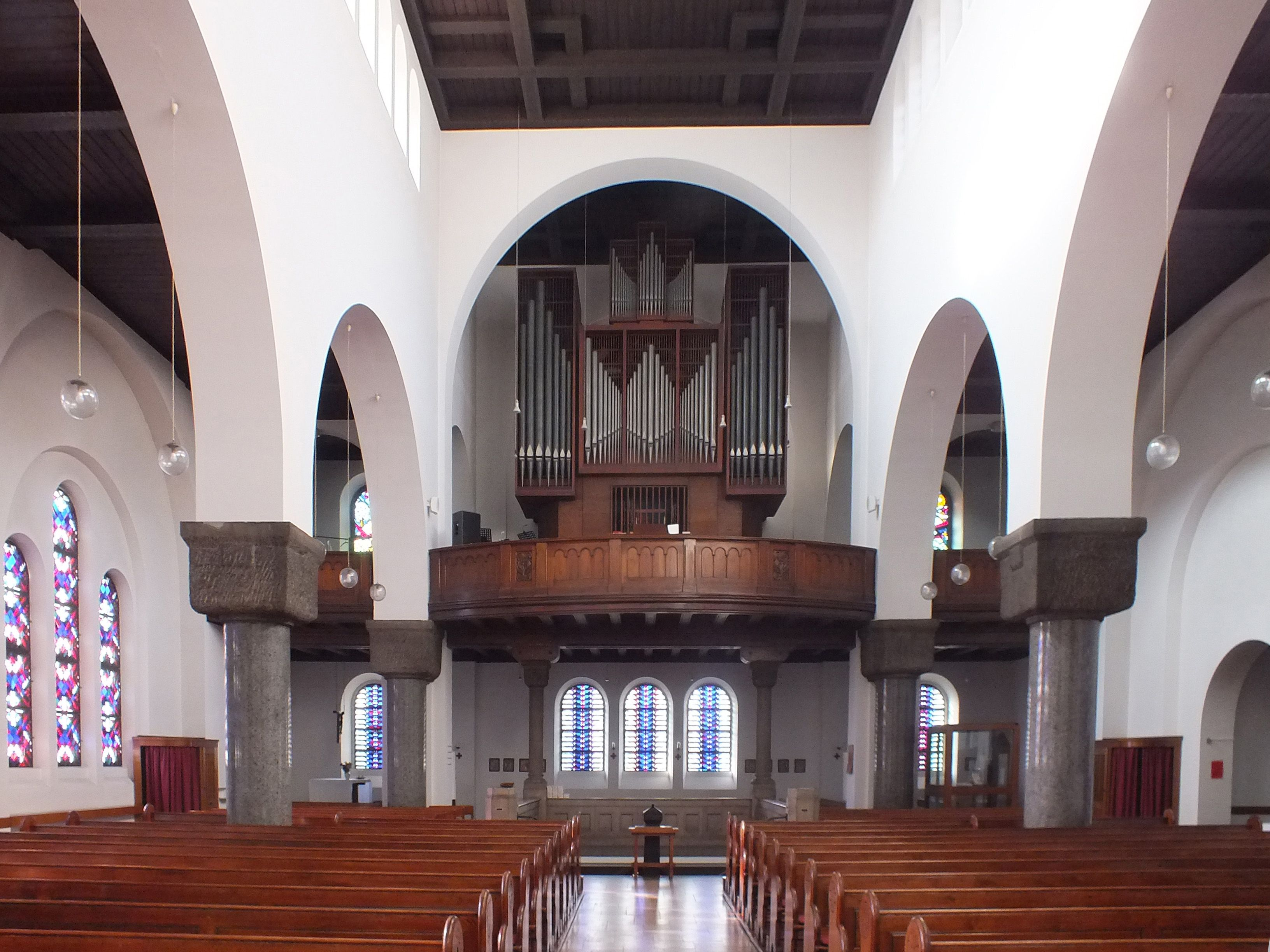 Orgel in der Liebfrauenkirche Leipzig-Lindenau